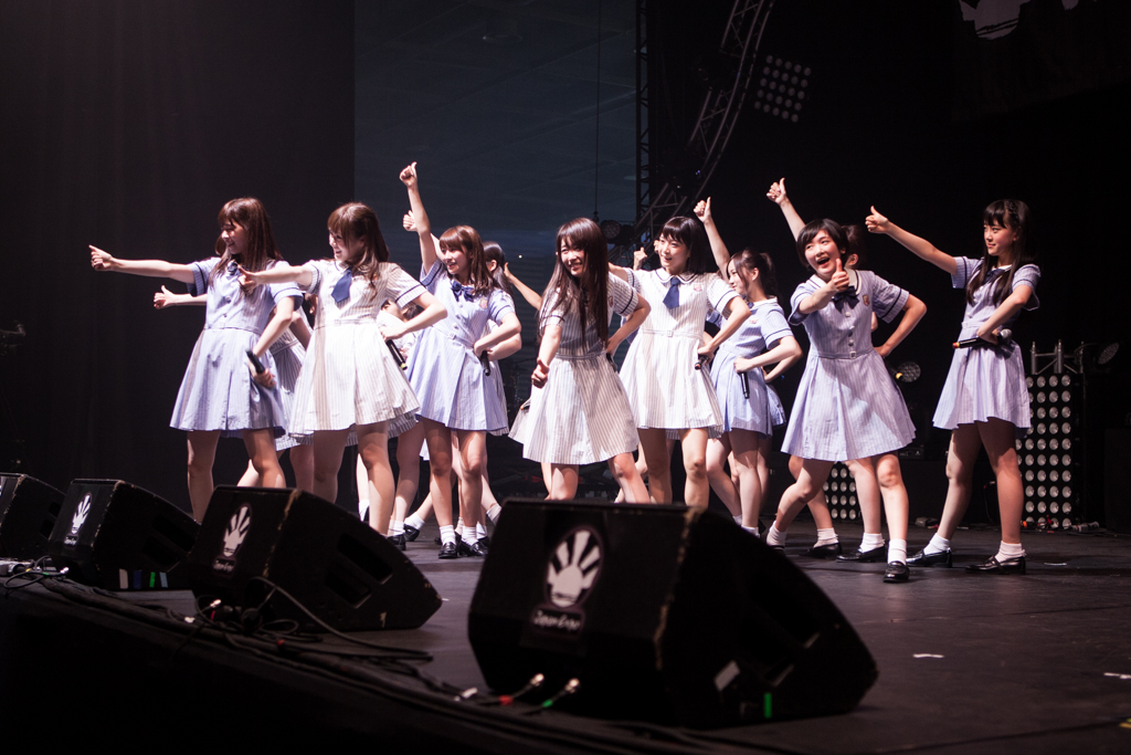 Nogizaka46